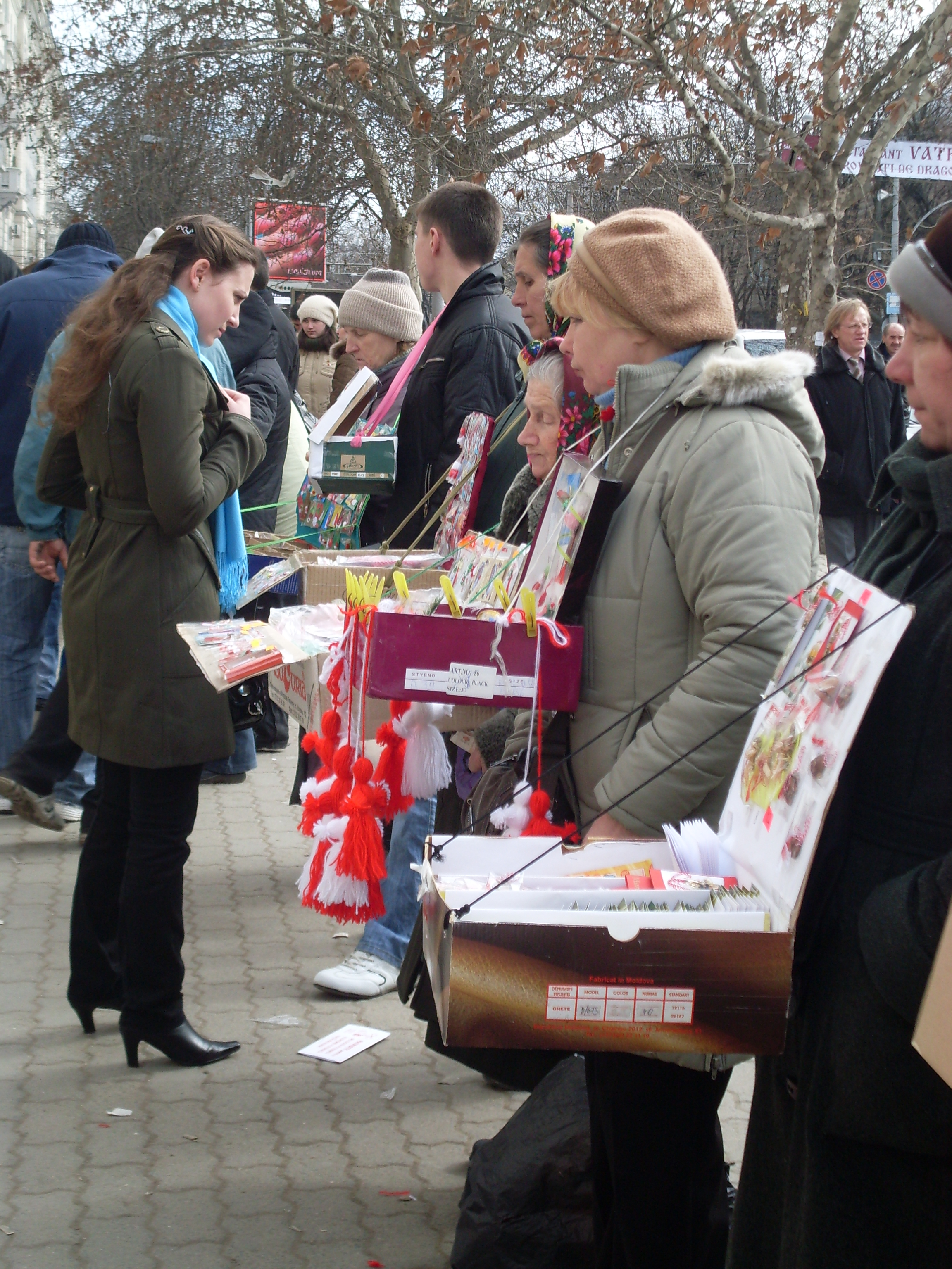 Rând de vânzători de mărţişoare în centrul Chişinăului (bd. Ştefan cel Mare)